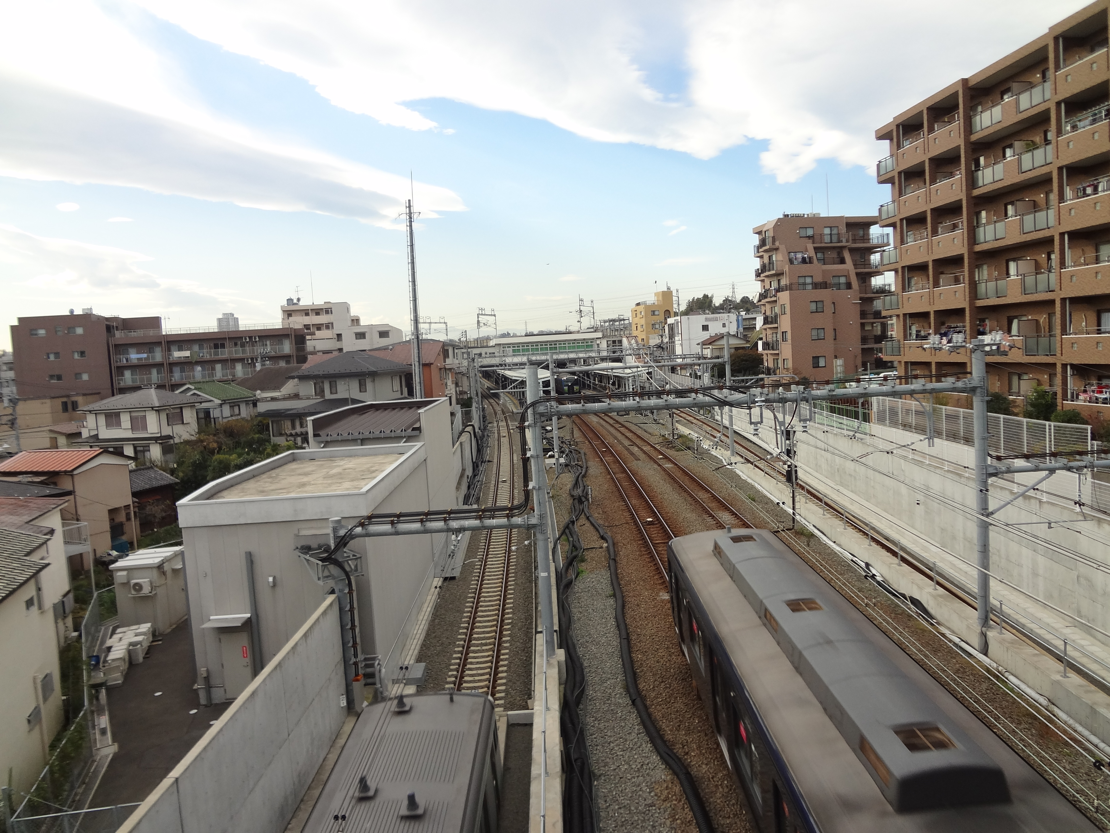 左の1番線は相鉄新横浜線、右の2番線は本線からの入線。